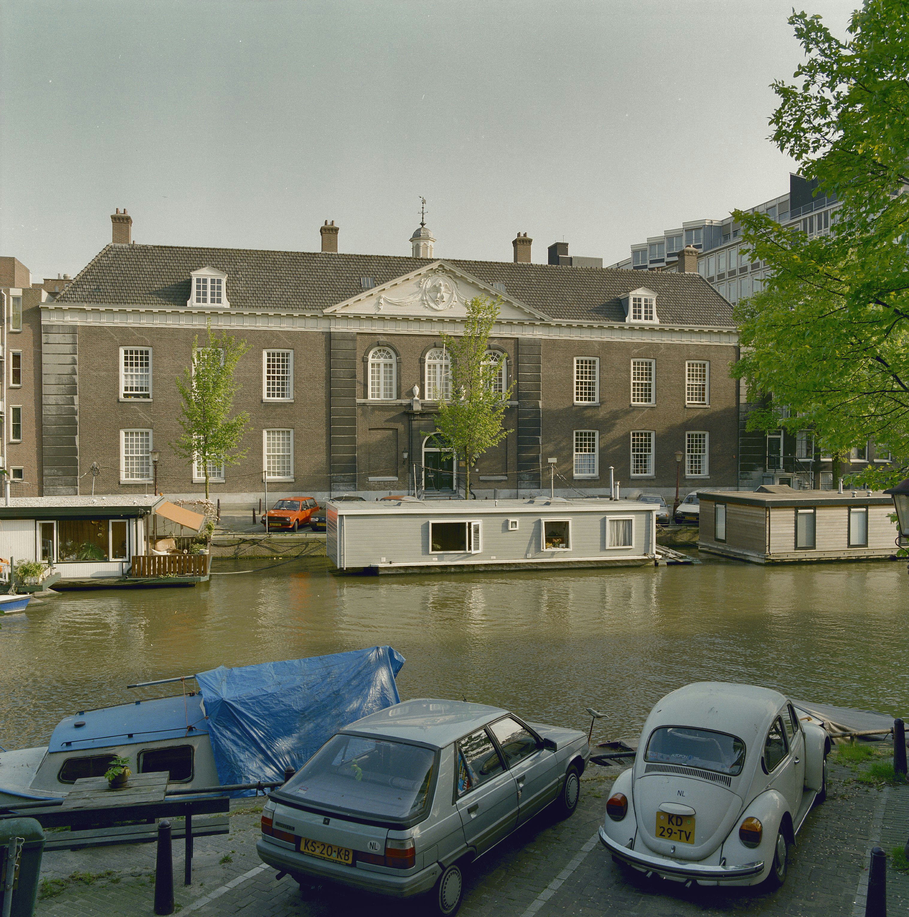 OCCO'S HOFJE: Exterieur OVERZICHT, VOORGEVEL